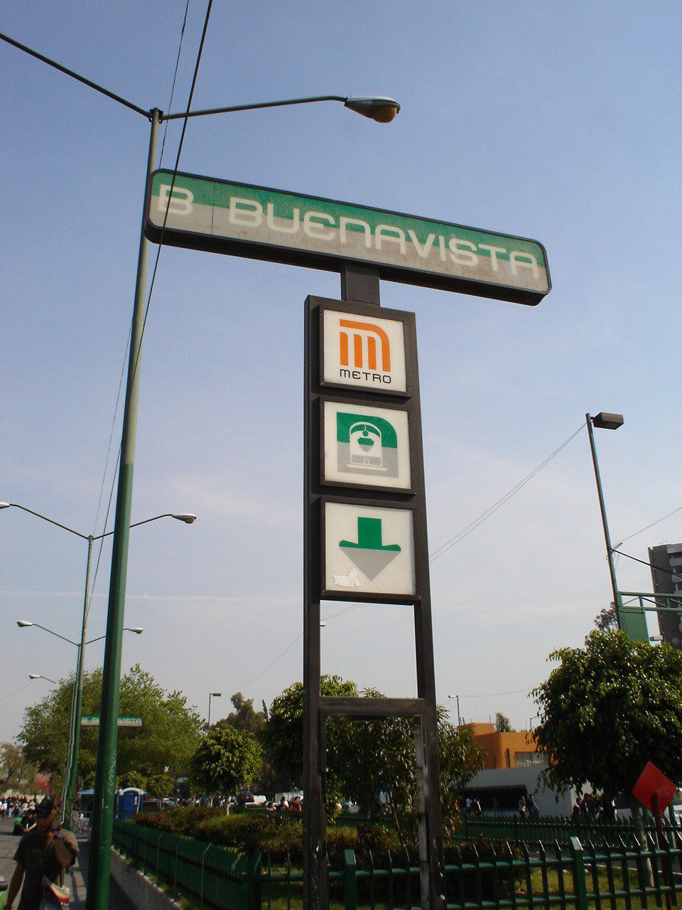 ESTACION BUENAVISTA